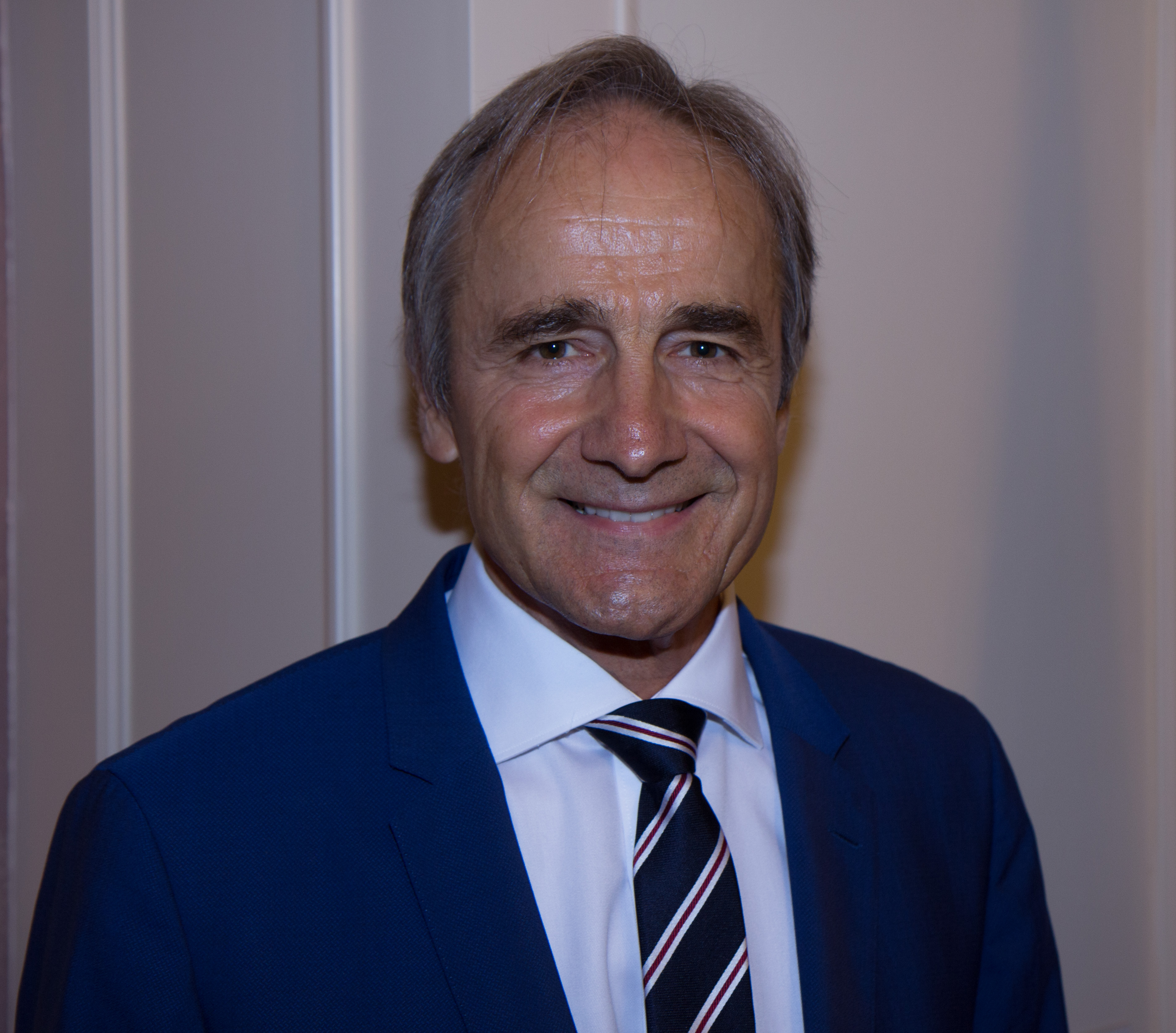 Sitzung der Hessischen Landesregierung mit dem Schwerpunkt Digitalisierung am 20. August 2018 in der Staatskanzlei. Teilnehmer: Karl-Heinz Streibich